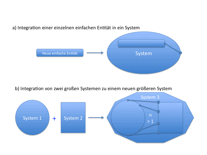 Für eine formale Darstellung kann eine jede Integration zurückgeführt werden auf die beiden gezeigten Extremfälle.